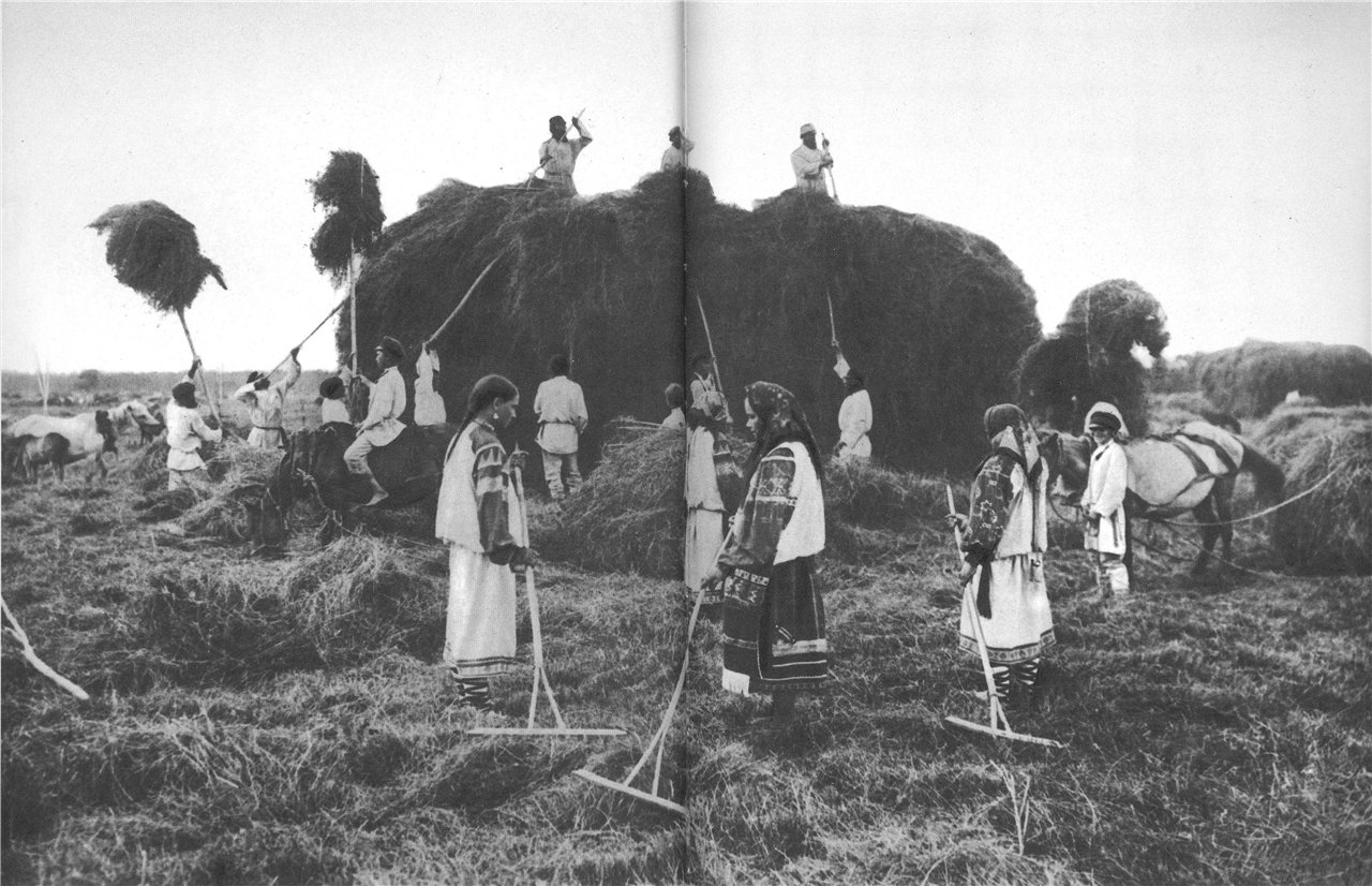 Сенокос в южнорусской деревне. Фотография начала XX века. Девушки в праздничных покосных подпоясанных рубахах, женщина в праздничном костюме.